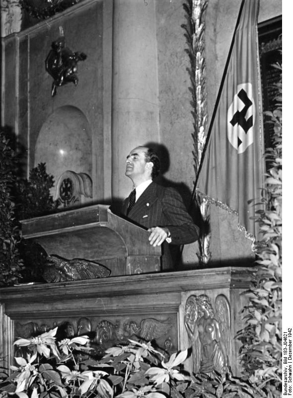 Berlin, Prof. Grassi am Rednerpult Eröffnung des italienischen wissenschaftlichen Institutes "Studia Humanitatis" in Berlin. U.B.z.: der Direktor des Instituts "Studia Humanitatis" Prof. Ernesto Grassi spricht. Foto: Schwahn 7.12.42 6773-42 Information added by Wikimedia users.Università di Berlino-Inaugurazione dell'Istituto "Studia Humanitatis" (7.12.1942)